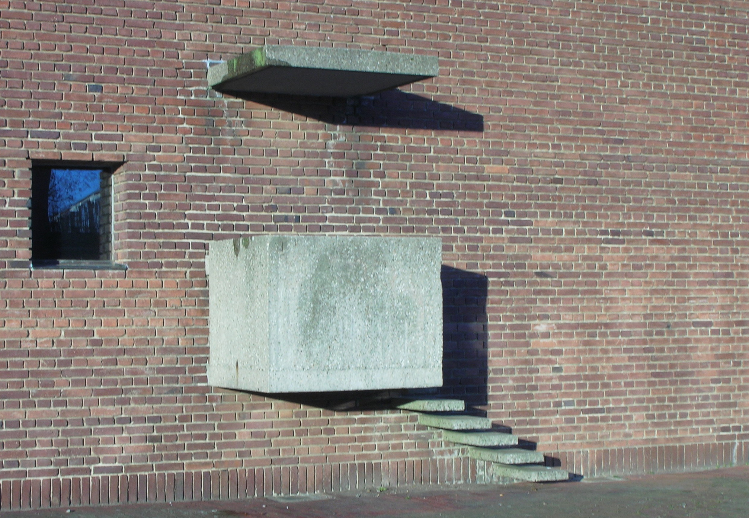 Outdoor pulpit on Helgeandskyrkan in Lund, Sweden.